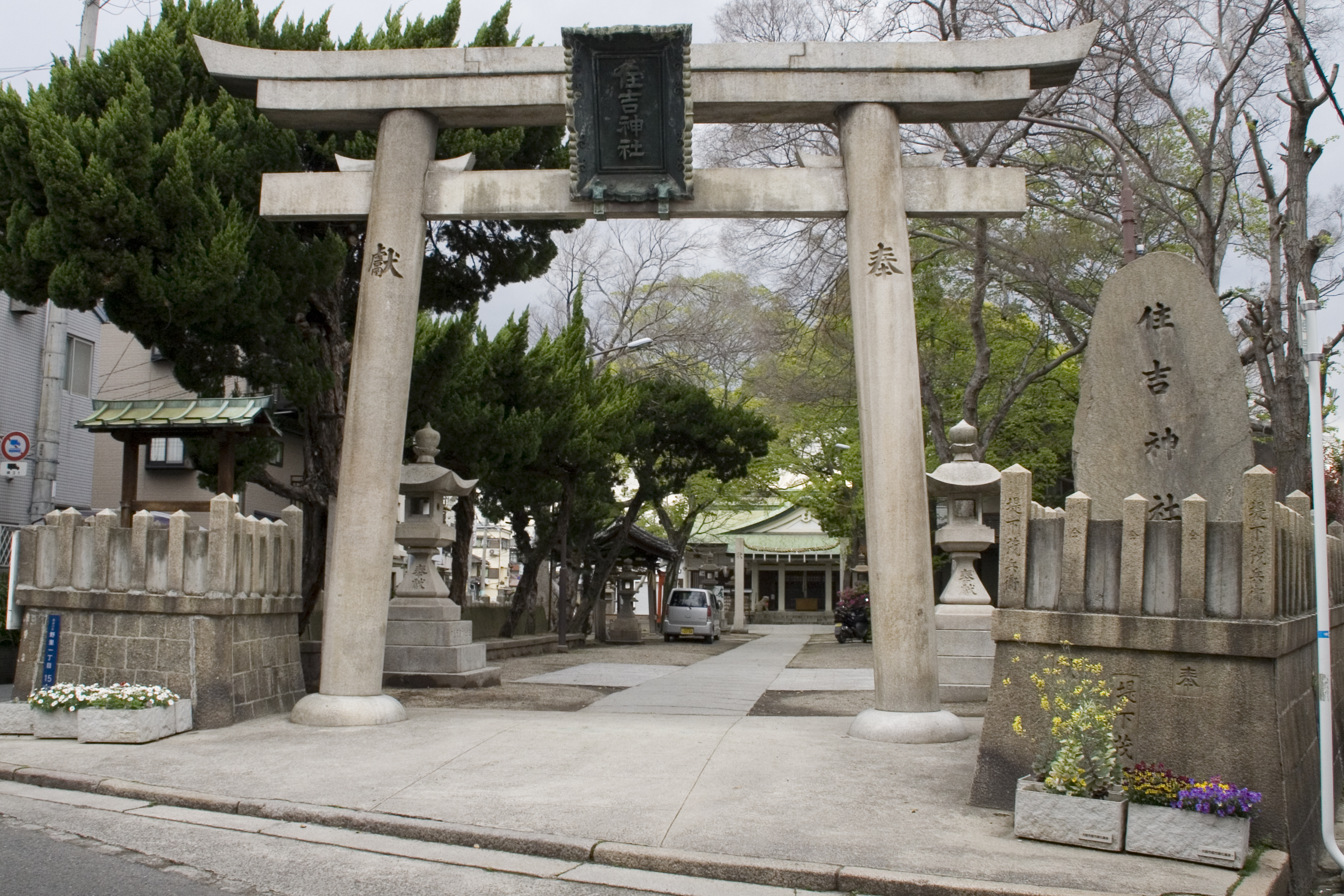 野里住吉神社